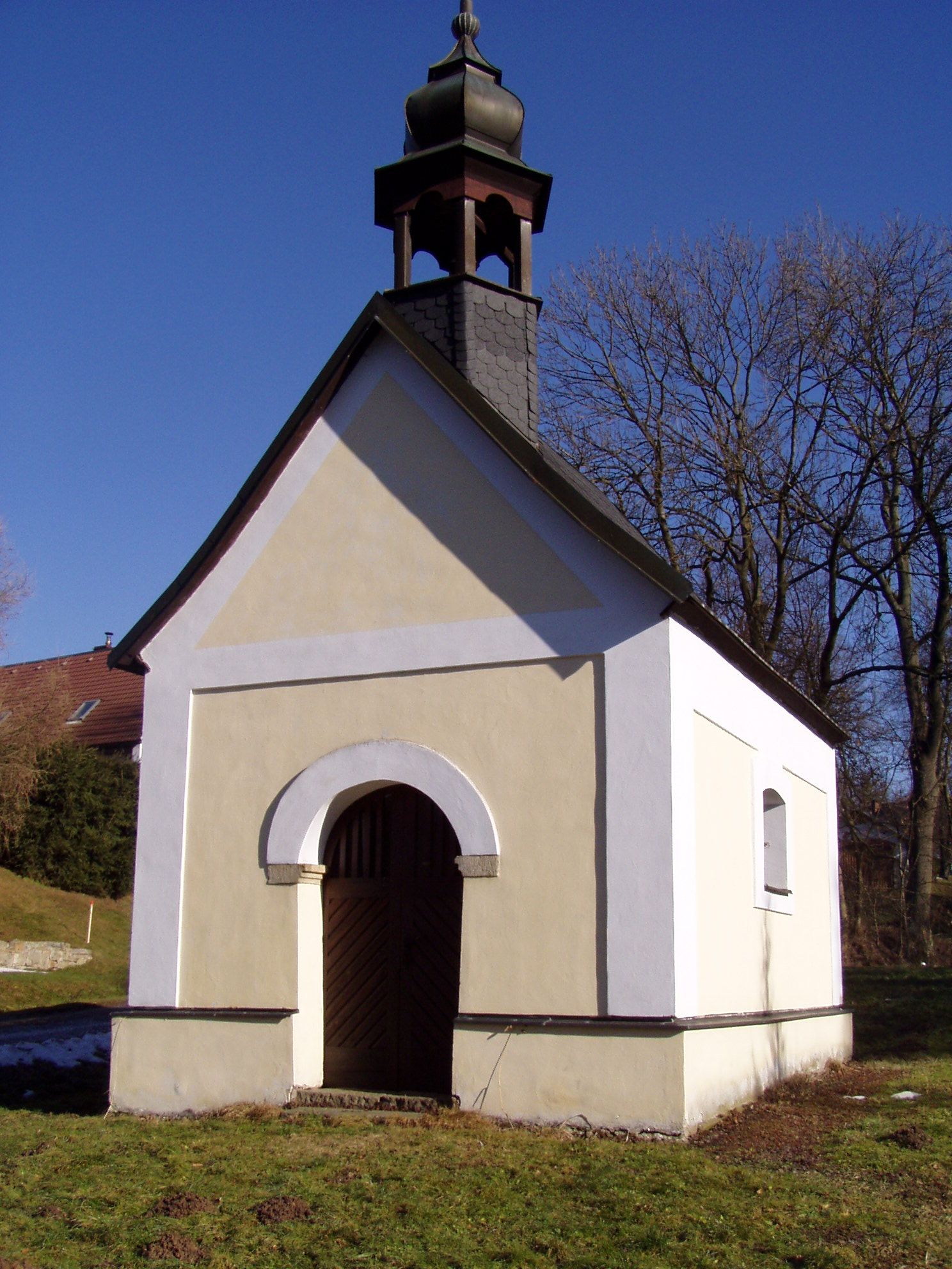 Chapel of Holy Trinity (Kladruby)